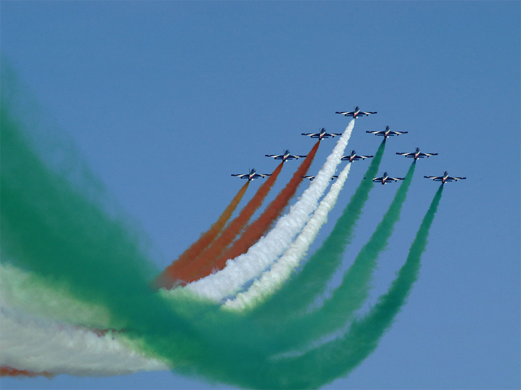 1-j2004-pan1